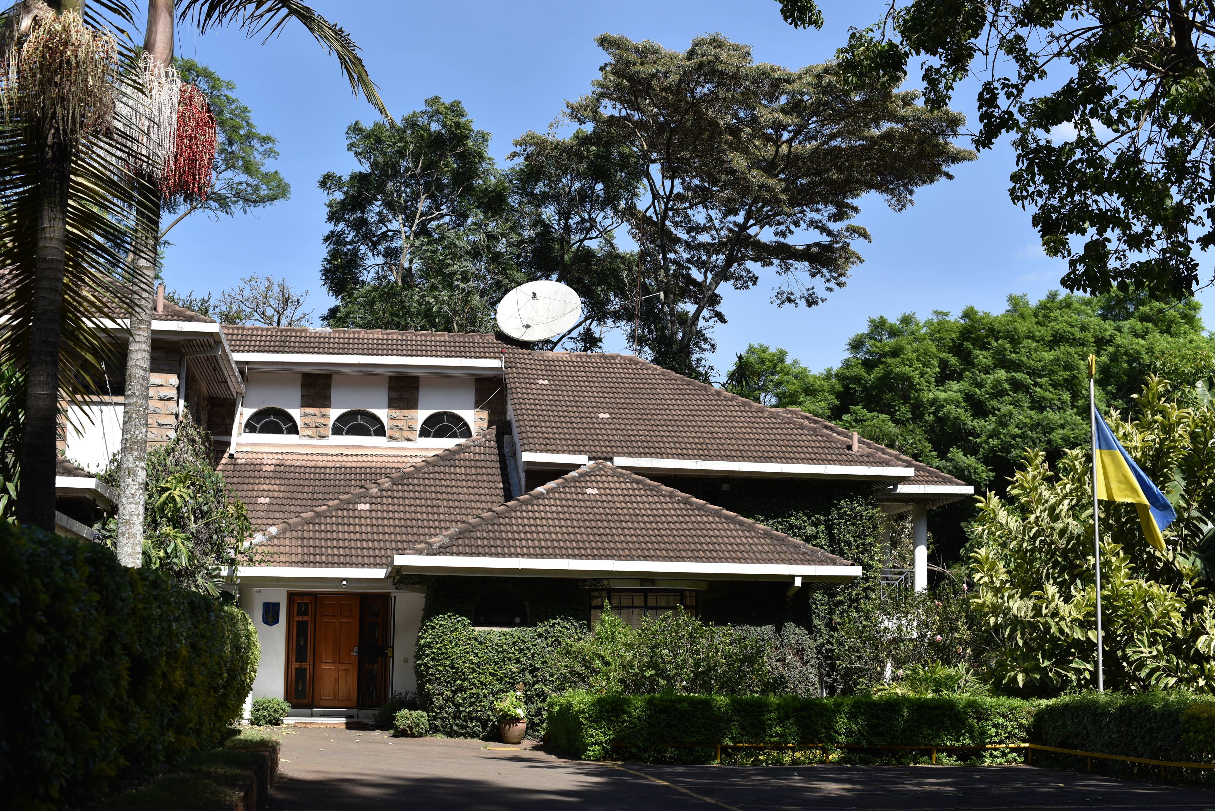 Будівля Посольства України у м.Найробі